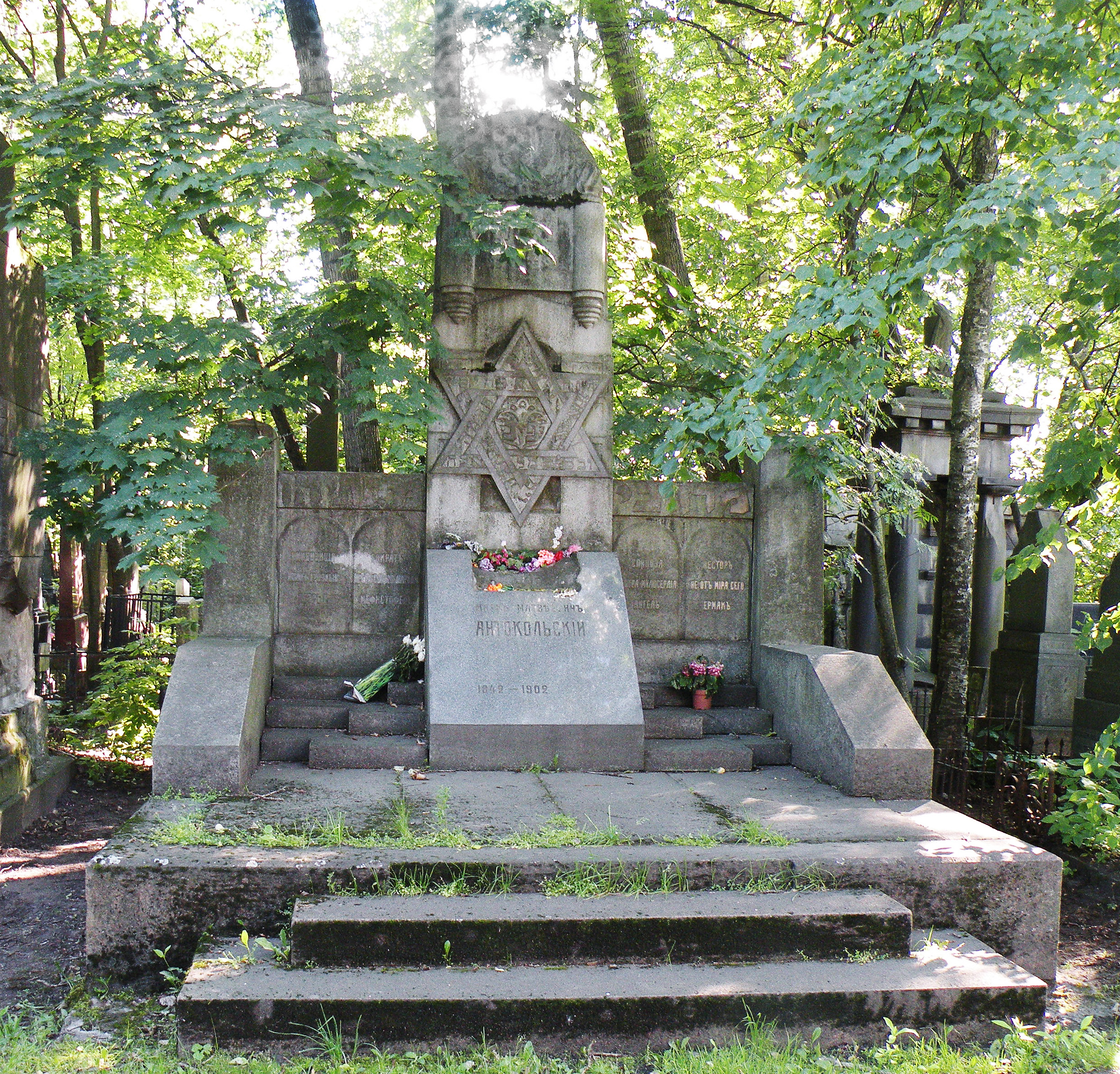 Надгробие Антокольского